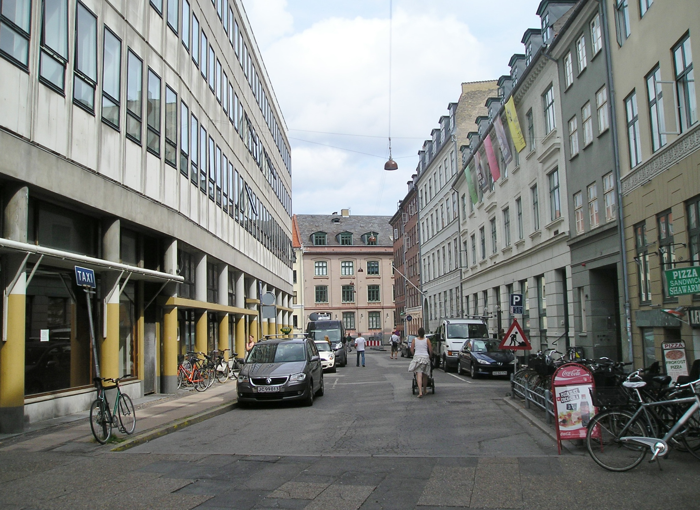 The street Pustervig in Copenhagen.